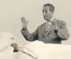 Prof. Kurt Thomas, Probe zur Bachwoche in Ulm, 1961